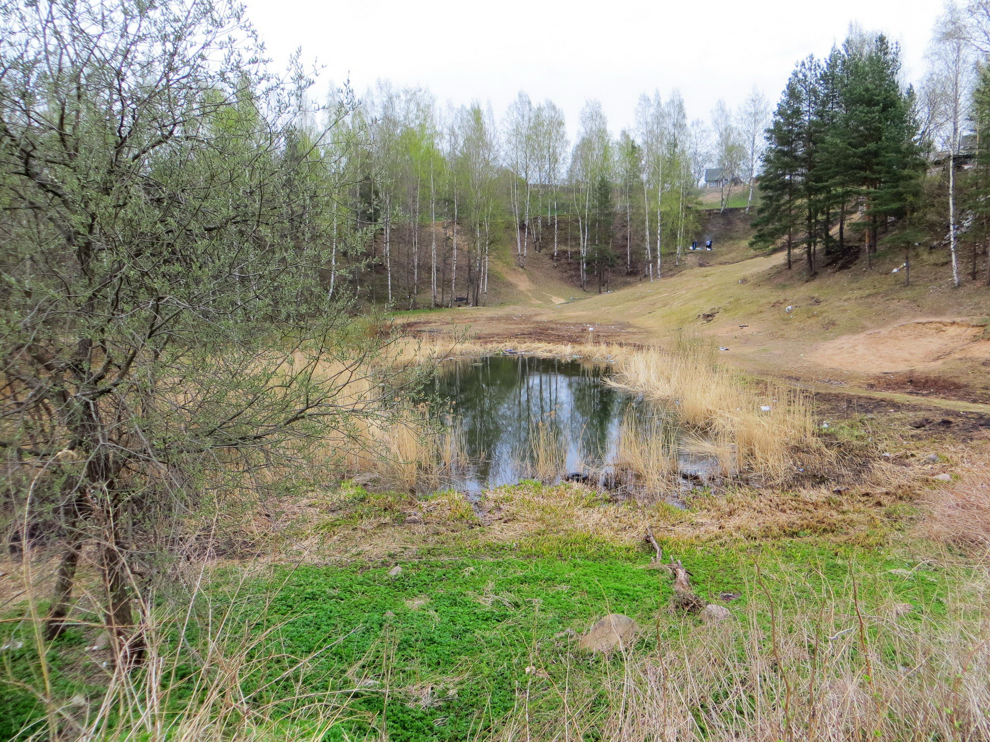 Бессточное озеро Песчанка, Румболовско-Кяселевская возвышенность, г. Всеволожск.